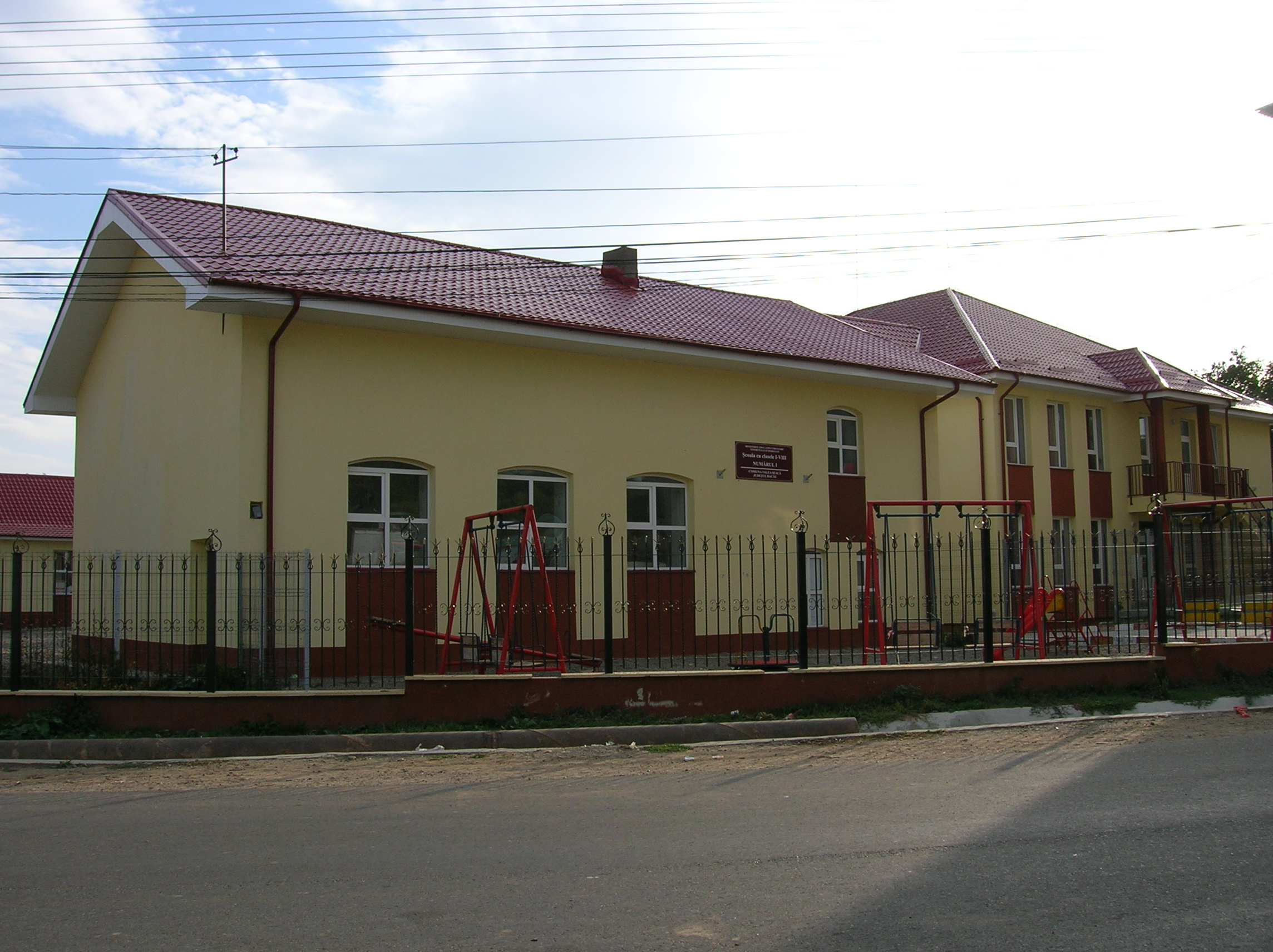 Comuna Valea Seacă Bacău - Satul Valea Seacă - Şcoala cu clasele I-VIII Nr. 1